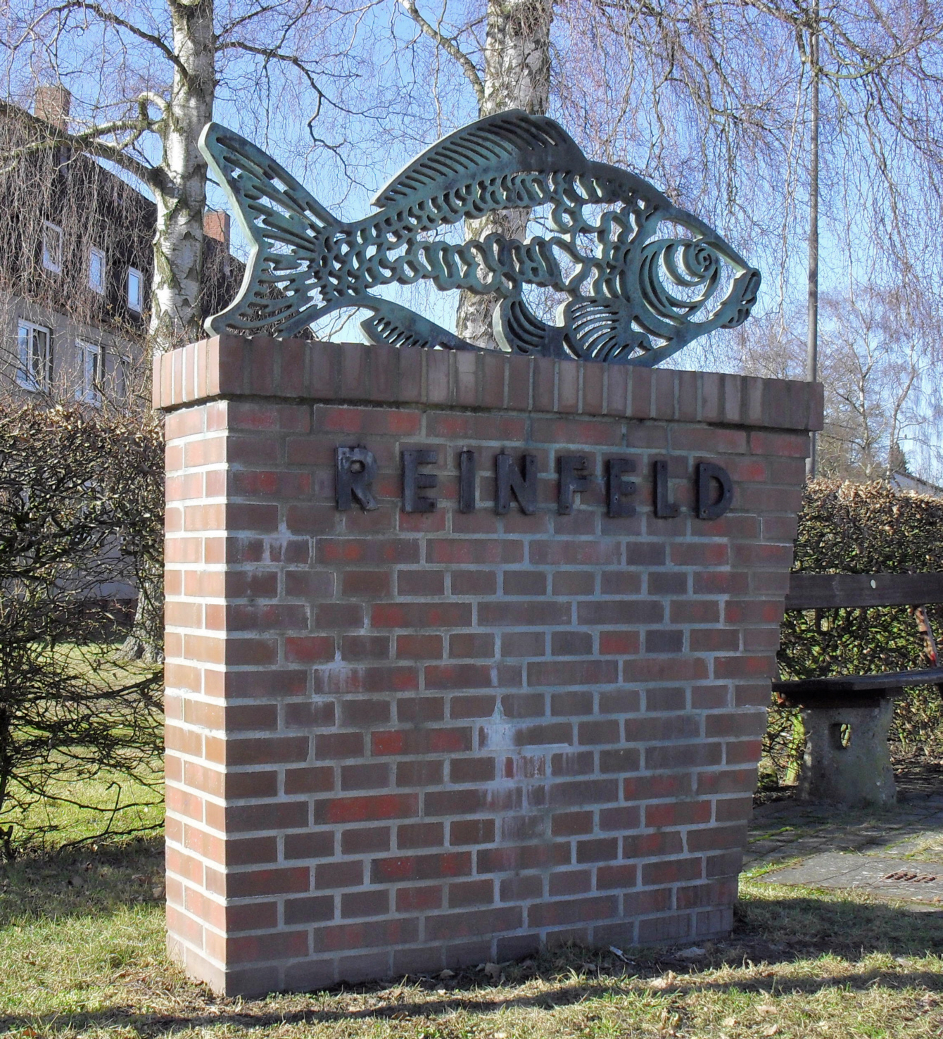 Das Karpfendenkmal an der Lübecker Chaussee in Reinfeld (Holstein)